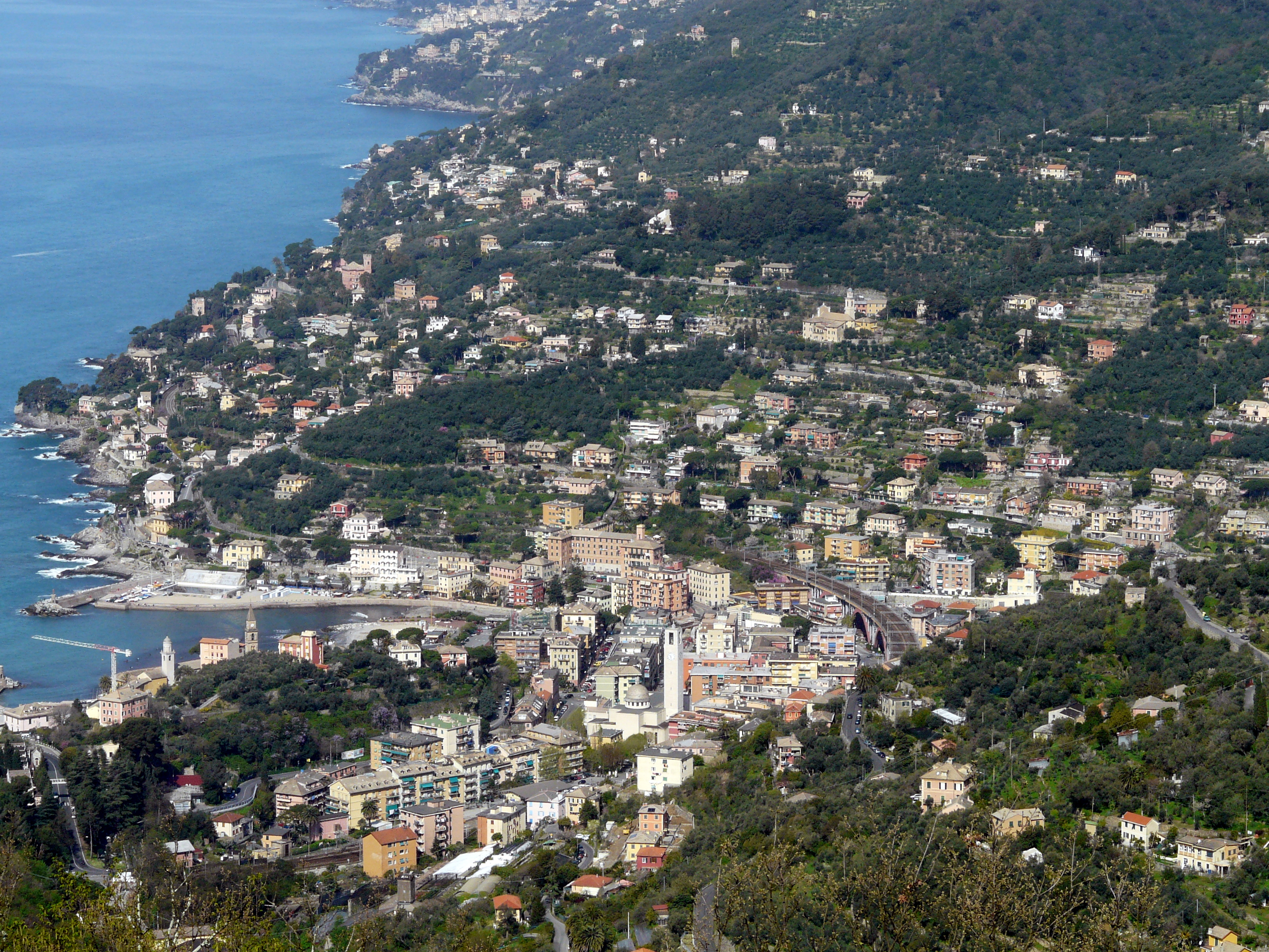 Panorama di Recco dal percorso verso il santuario della Madonna di Caravaggio (Rapallo), Liguria, Italia